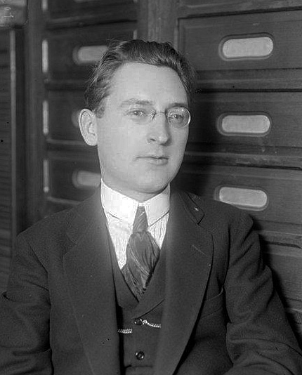 M. Charles Frey, député d'Alsace : [photographie de presse] / [Agence Rol]. Bibliothèque nationale de France.